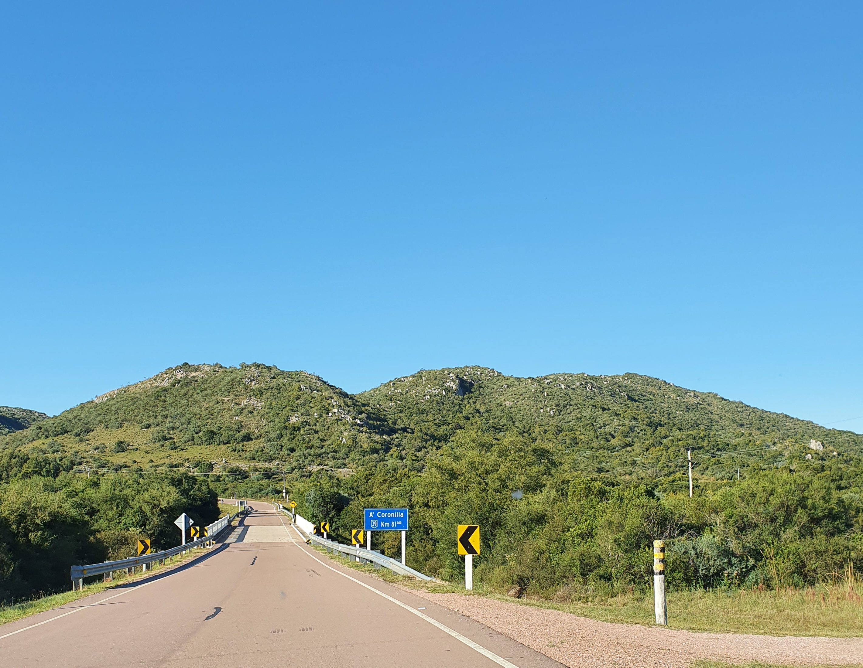 Ruta 39 km 81 a su paso por el arroyo Coronilla, próximo a la localidad de Aiguá, departamento de Maldonado, Uurguay.